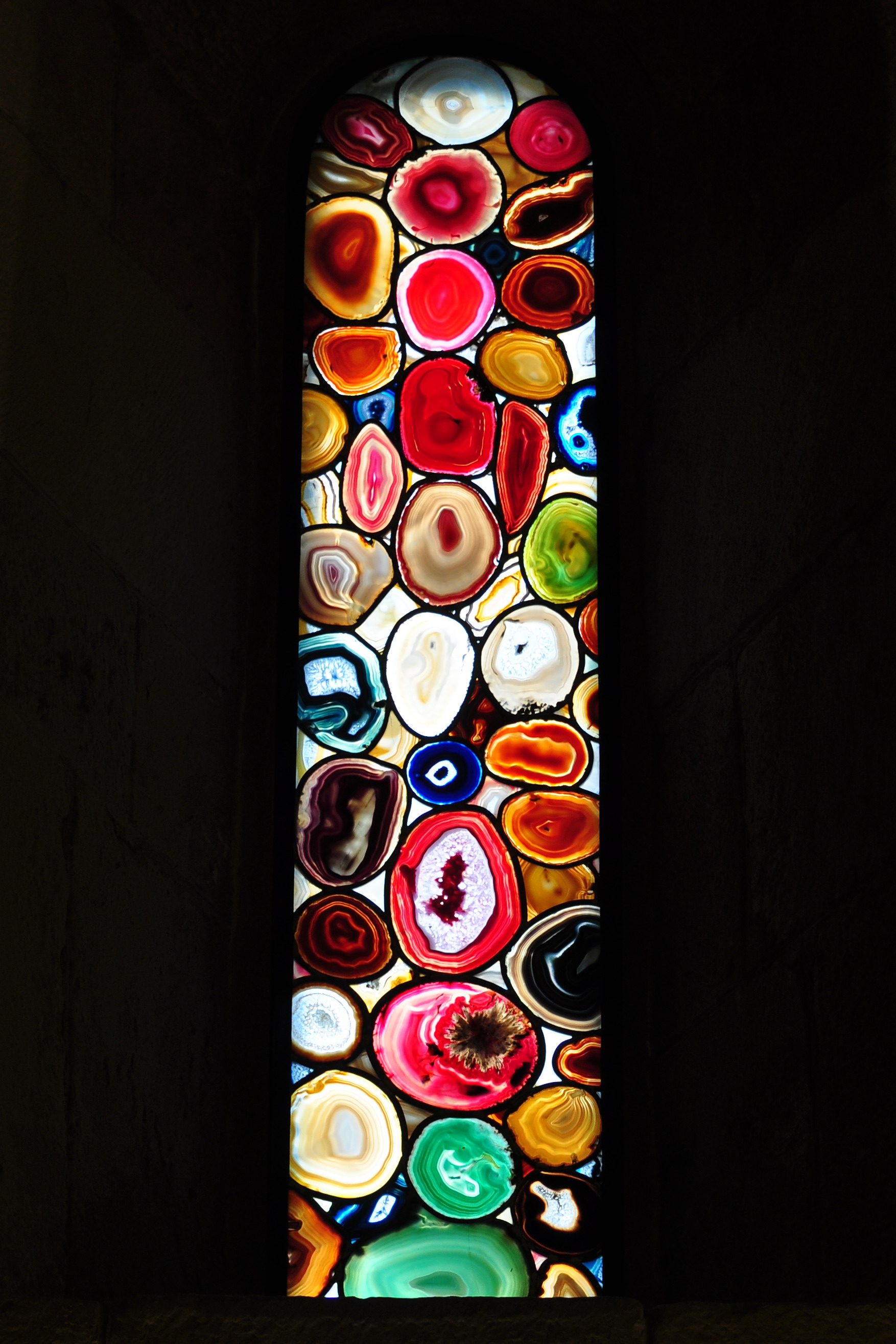 Grossmünster in Zürich (Switzerland)